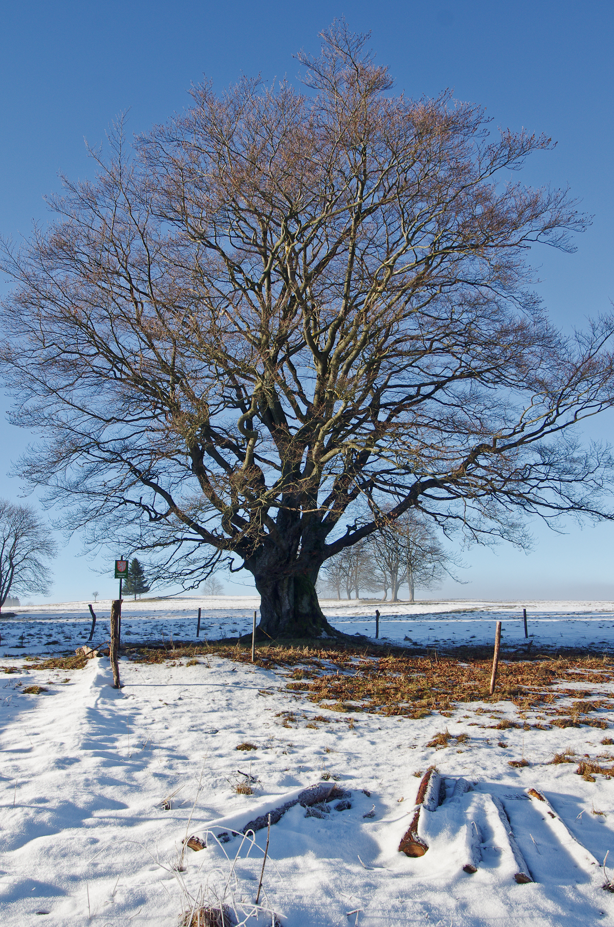 Lazy (Horní Lazy), Slavkovský les, Pastýřský dub, památný strom má malebnou korunu, rozvětvenou z jednoho místa, velké kořenové náběhy, výška 22 m, obvod kmene 617 cm (údaje z roku 2010)